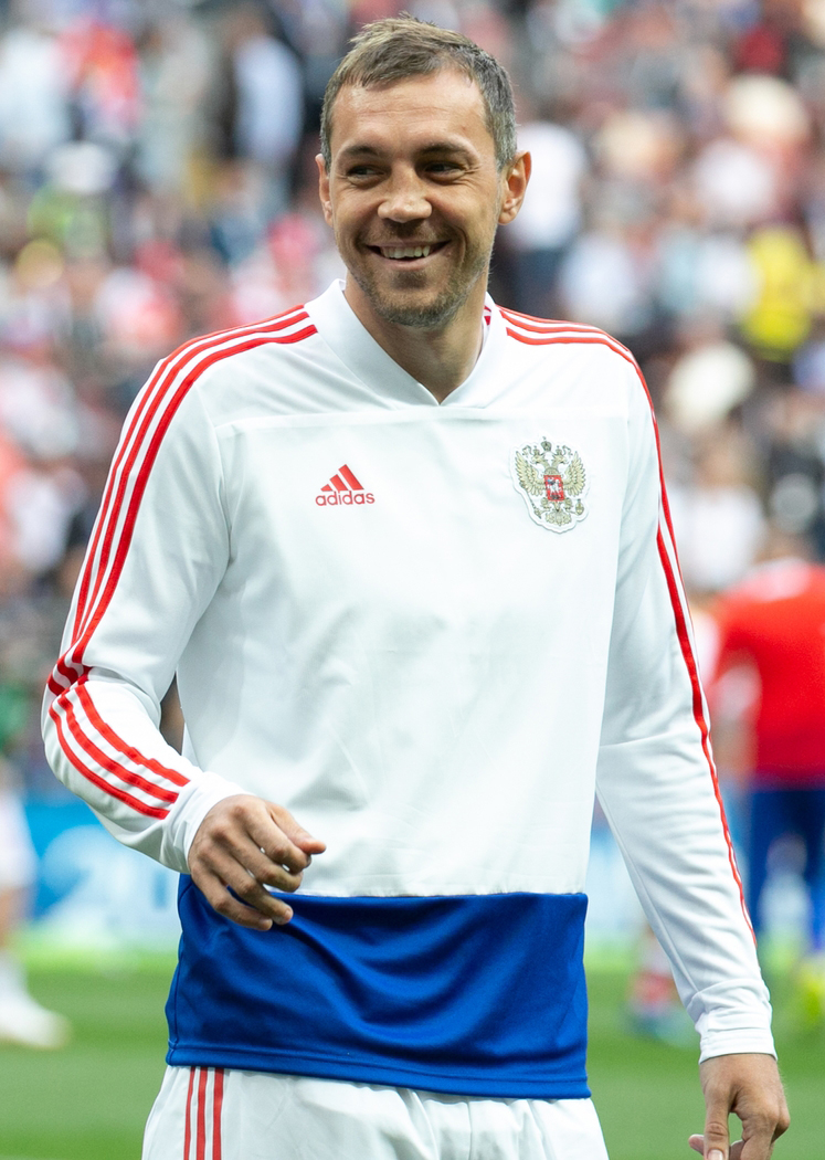 14.06.2018. Россия, Москва, «Лужники». Игроки «Зенита» в сборной России на Чемпионате Мира-2018. Матч Россия — Саудовская Аравия.